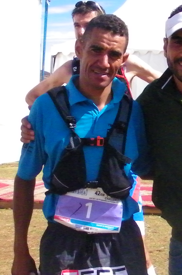 Rachid lors de l'ultra-trail de l'Atlas Toubkal